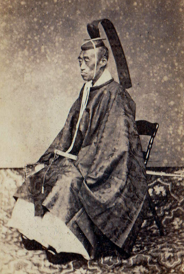 a Japanese man 鍋島直正 (Naomasa Nabeshima)